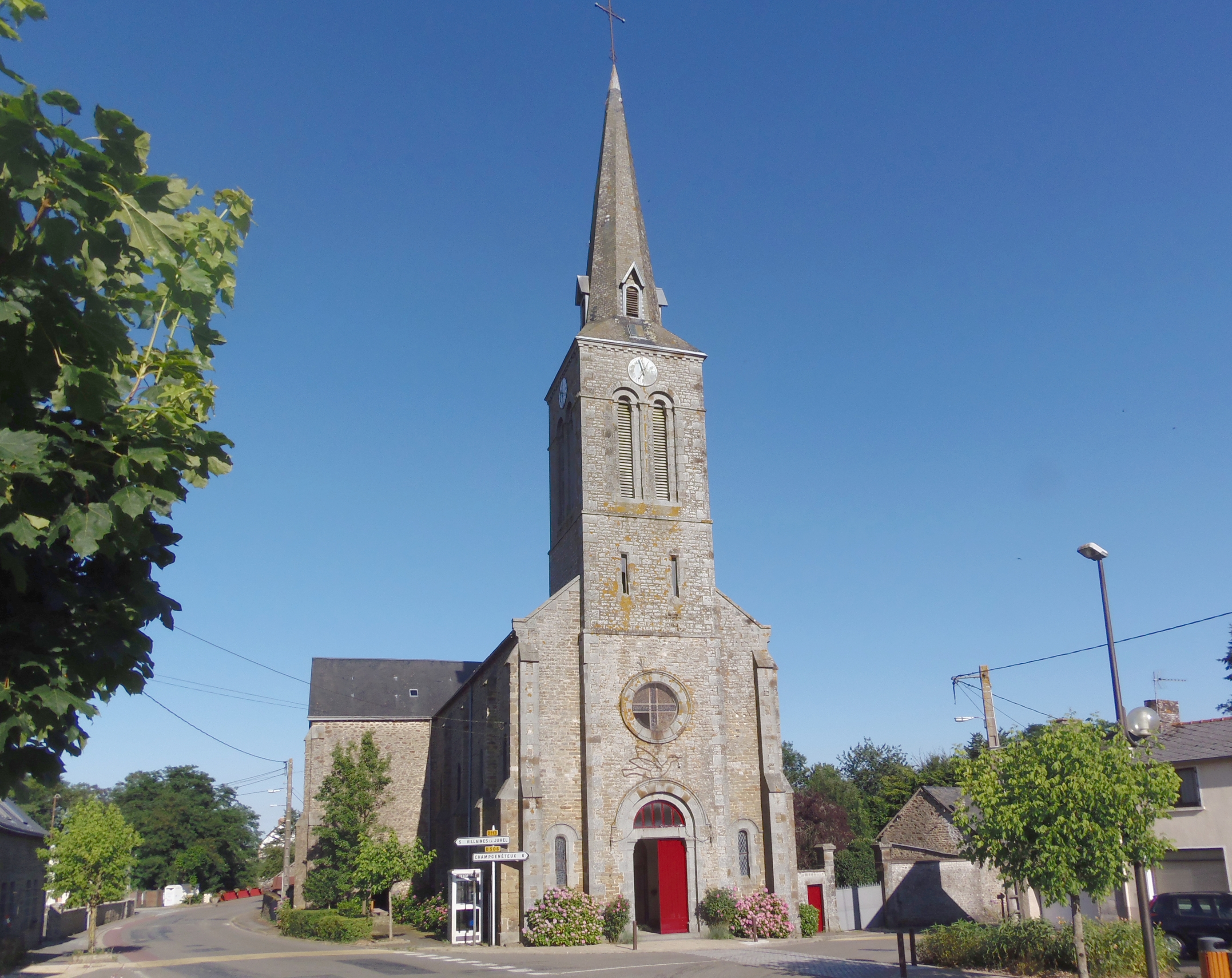 Loupfougères (Pays de la Loire, France). L'église Saint-Martin.